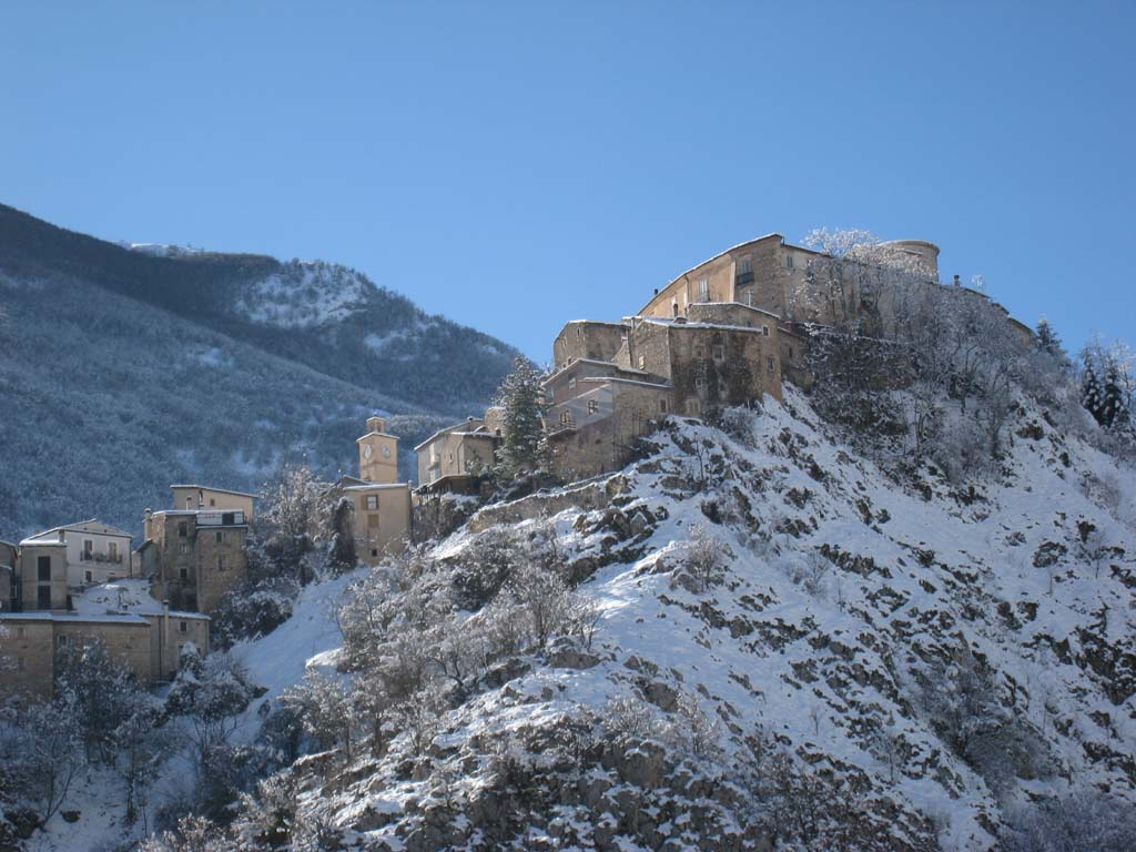 Villalago e la antica torre